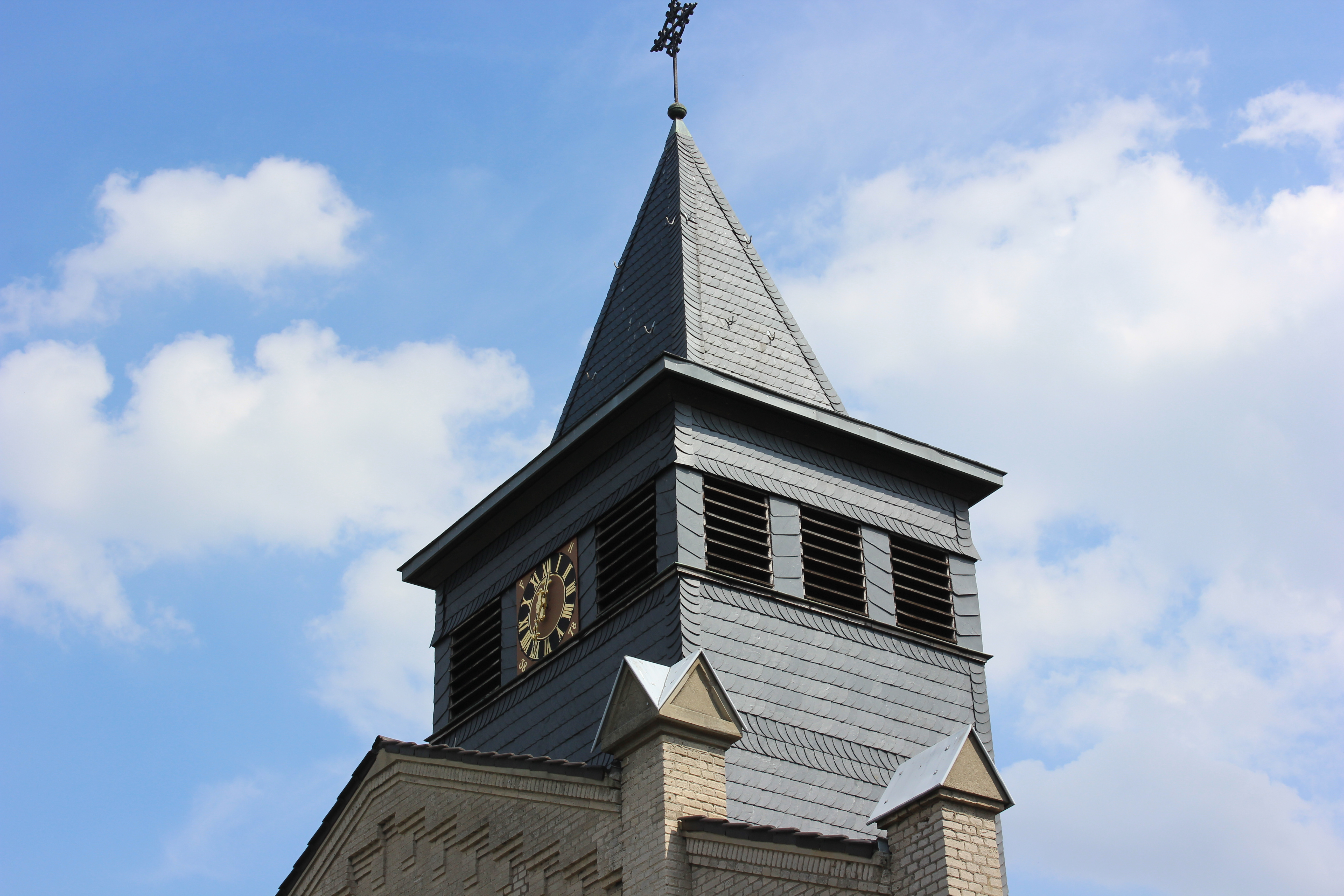 St. Marien in Dorsten-Hervest, Landkreis Recklinghausen, Nordrhein-Westfalen, Deutschland